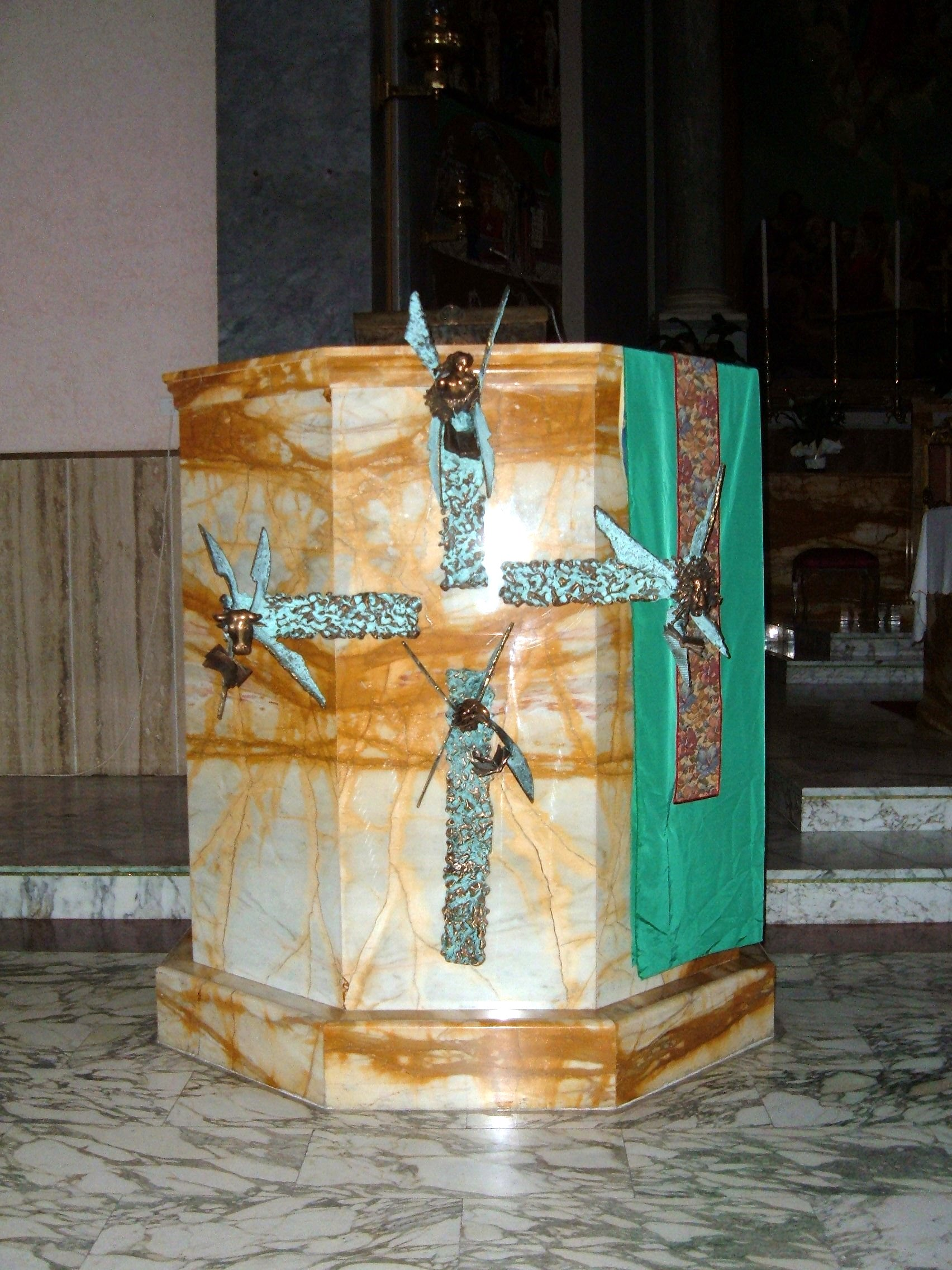 Chiesa parrocchiale di Santa Maria Assunta al Tufello, a Roma, nel quartiere Monte Sacro, in via Capraia. Ambone.